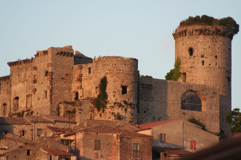 Riardo (Provincia di Caserta), Campania, Italy